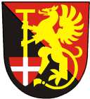 Znak obce Bezuchov